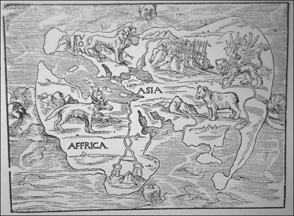 Hans Luffts kart "Daniels drømmekart", 1500-tallet